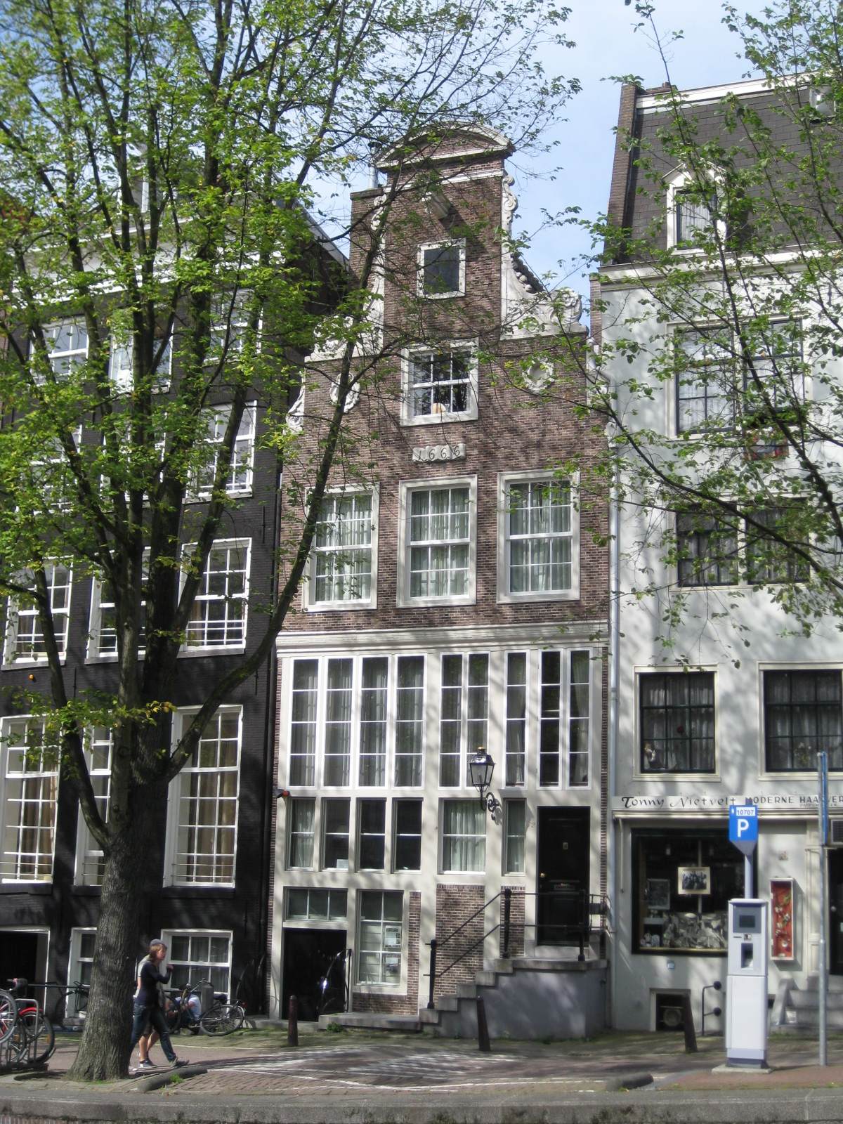 Leidsegracht 72, Amsterdam